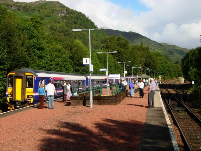 Ardlui Station